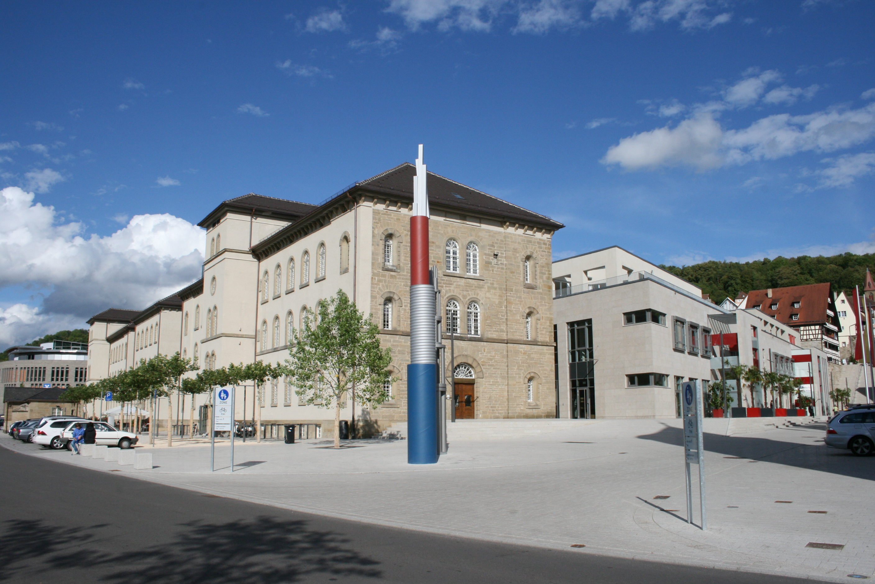 Die ehemalie Justizvollzugsanstalt und das neu errichtete Kocherquartier in Schwäbisch-Hall. Skulptur im Vordergrund: Die drei Türme (2003) von Stephan Kern (*1955 Ludwigshafen)